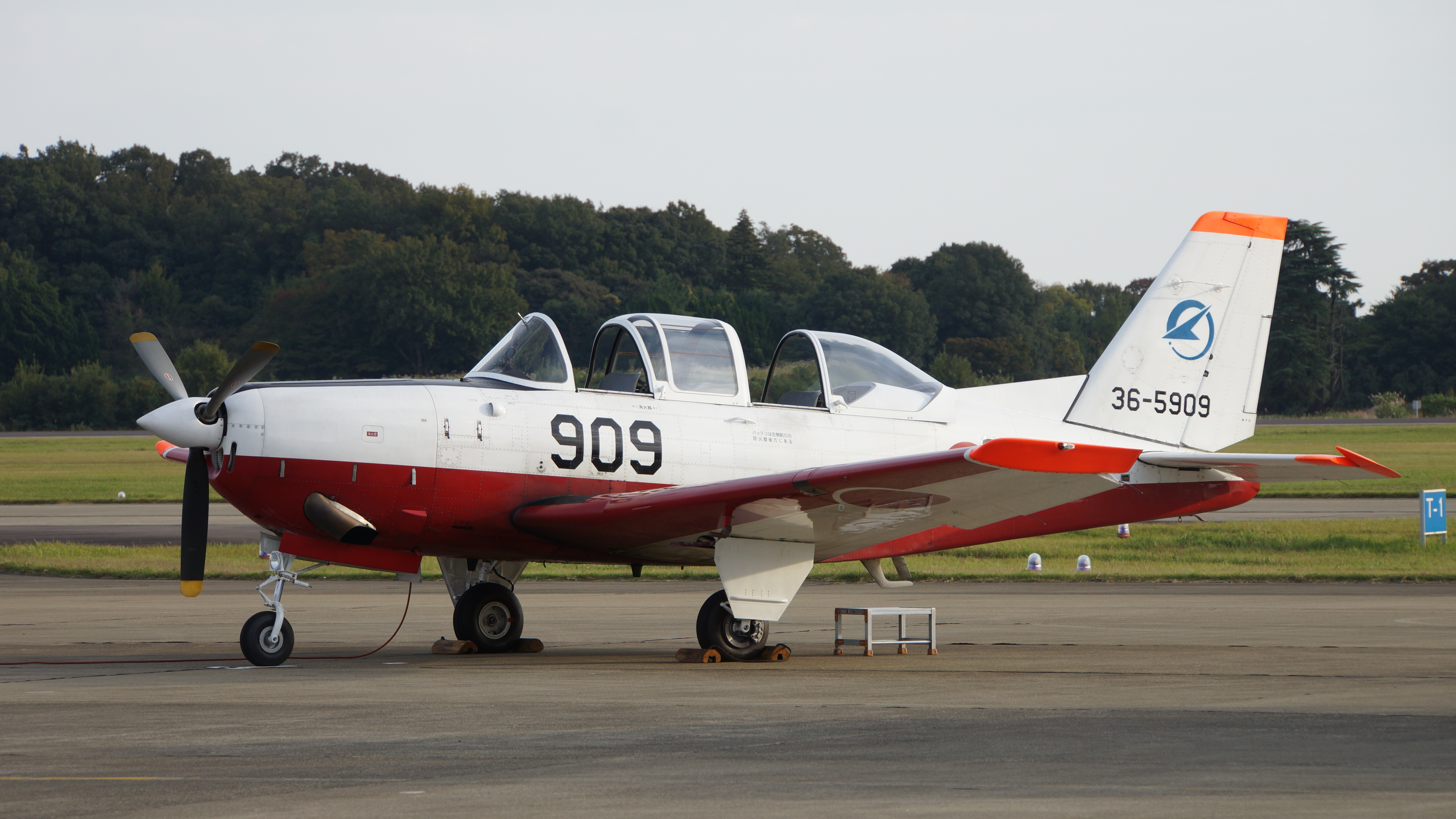 航空自衛隊 T-7初等練習機（36-5909号機）。2016年10月30日 岐阜基地にて